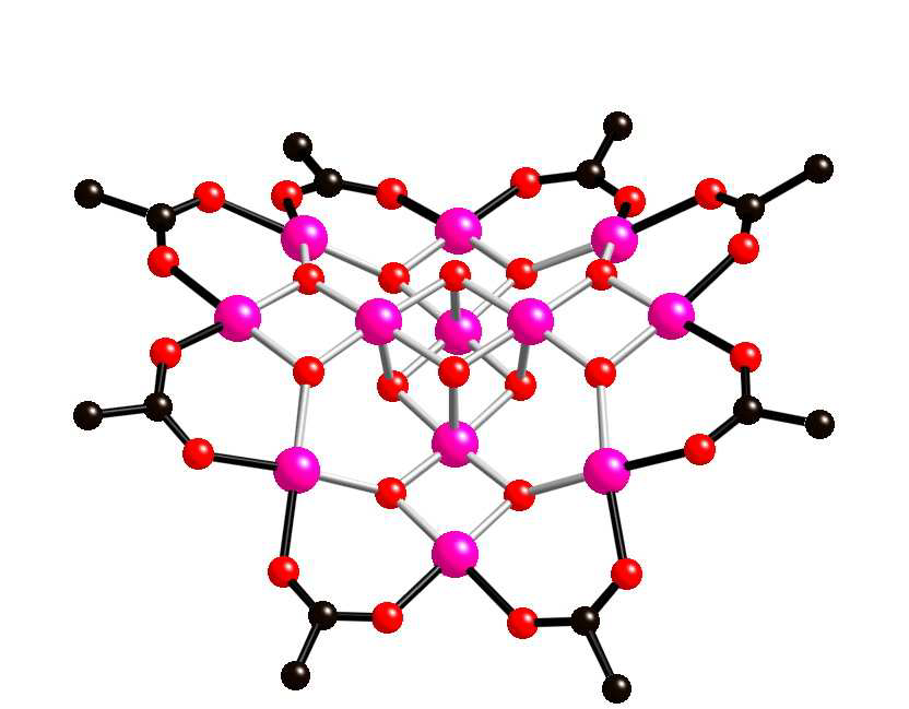 Vista superior del Mn12, preparado con CrystalMaker por Alicia Forment Aliaga.